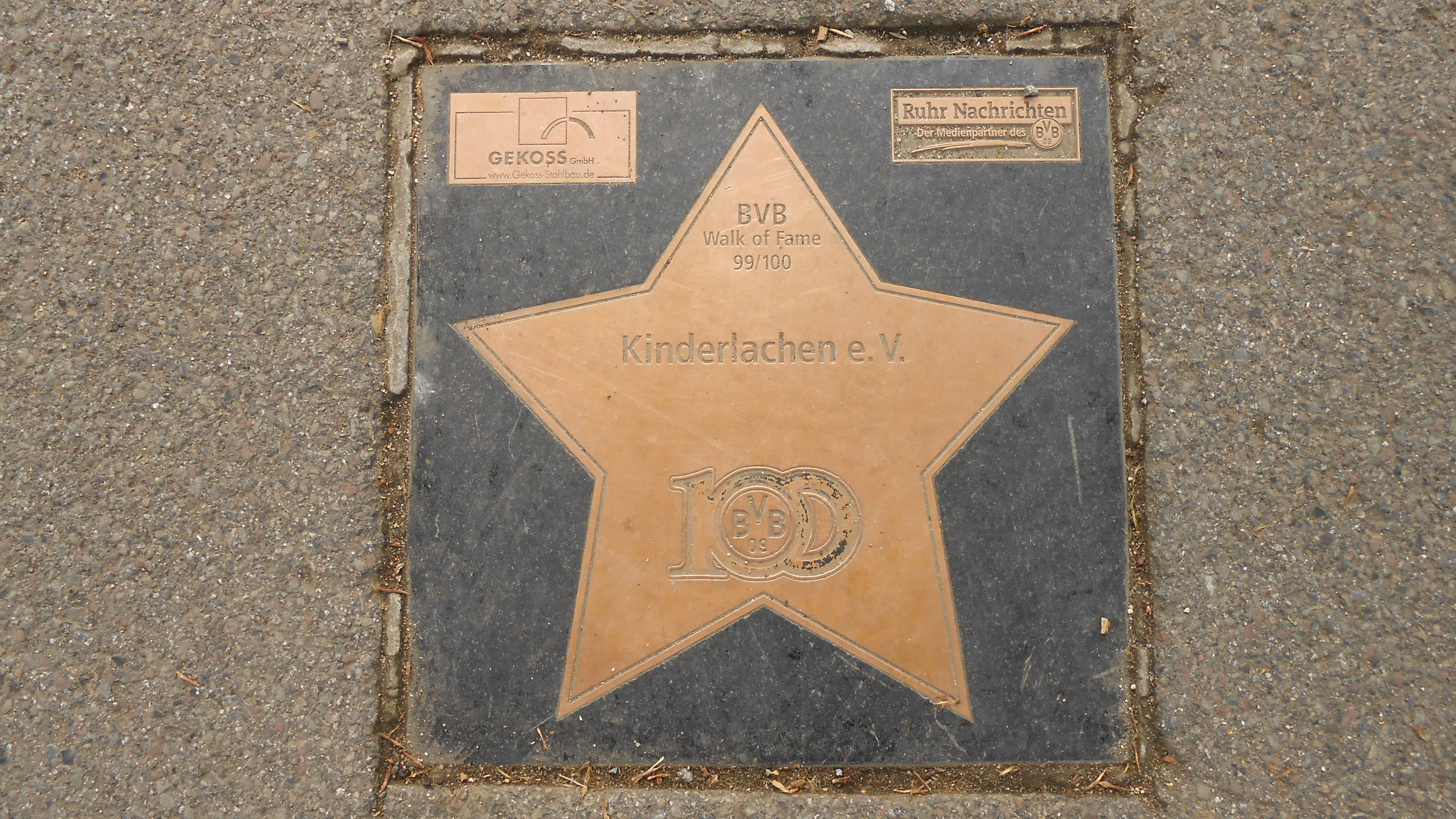 BVB Walk of Fame Nr. 99/100ː Kinderlachen e.V.